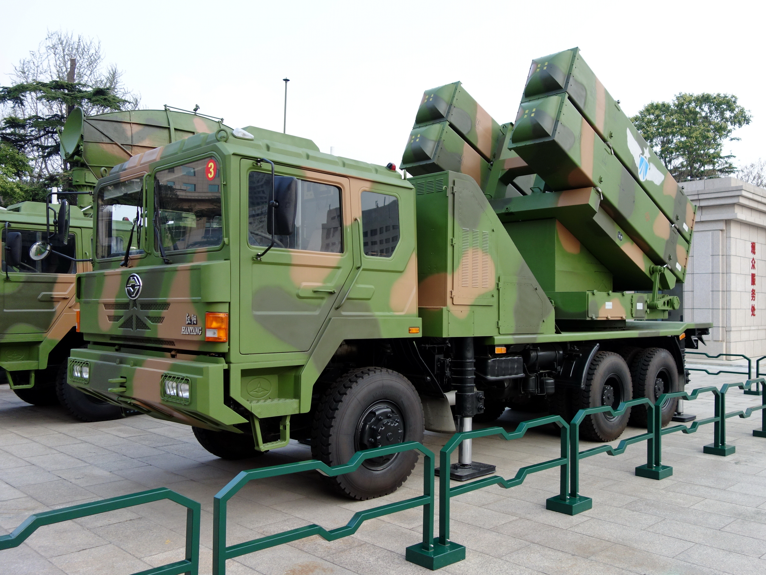 红旗6A型（HQ-6A）弹炮防空武器系统导弹发射车，拍摄于中国人民革命军事博物馆。